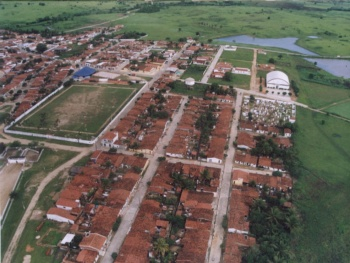 Foto Aérea da Cidade de Várzea-RN